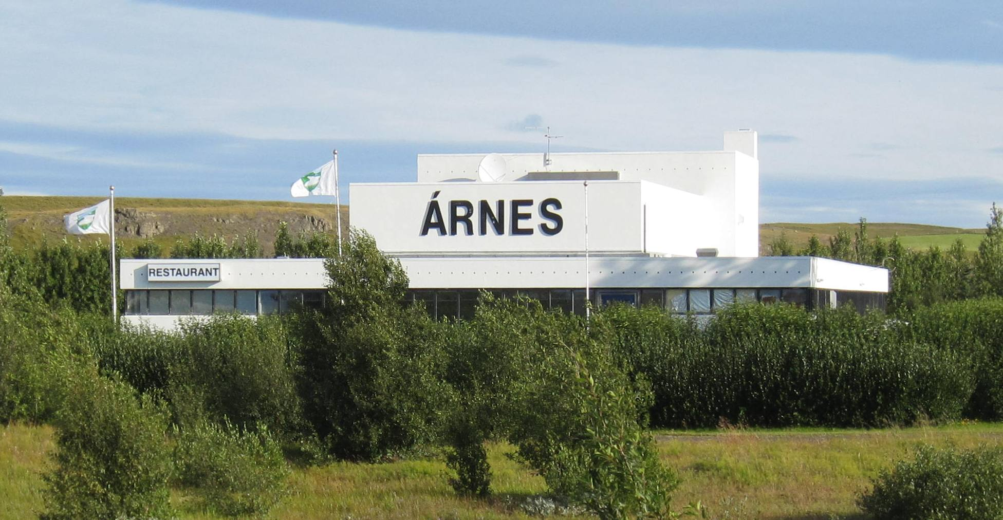 Þjórsárstofa er í félagsheimilinu Árnesi.